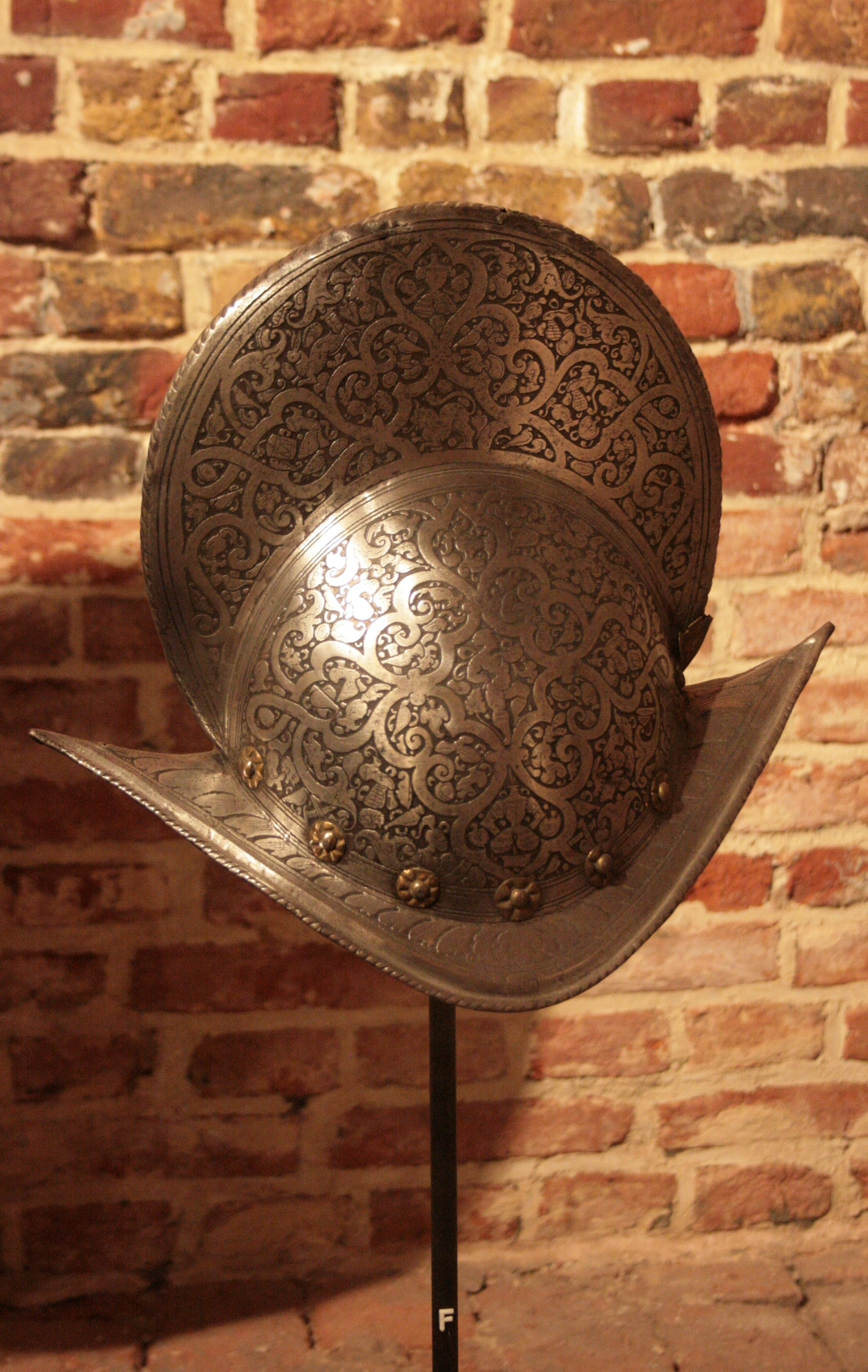 Porte de Hal, Bruxelles, Belgique (1381). Morion